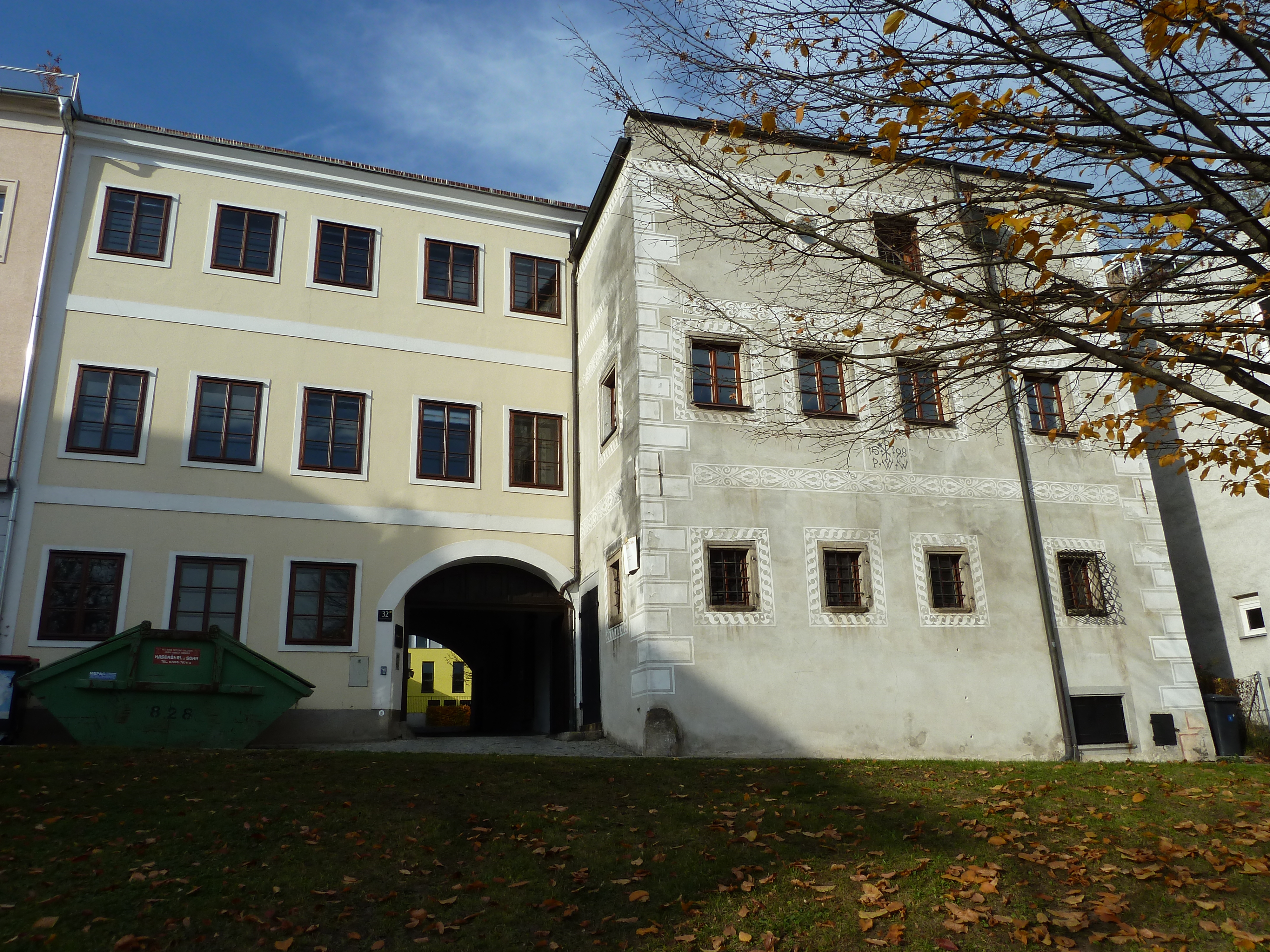 Bürgerhaus, Schiffmeisterhaus